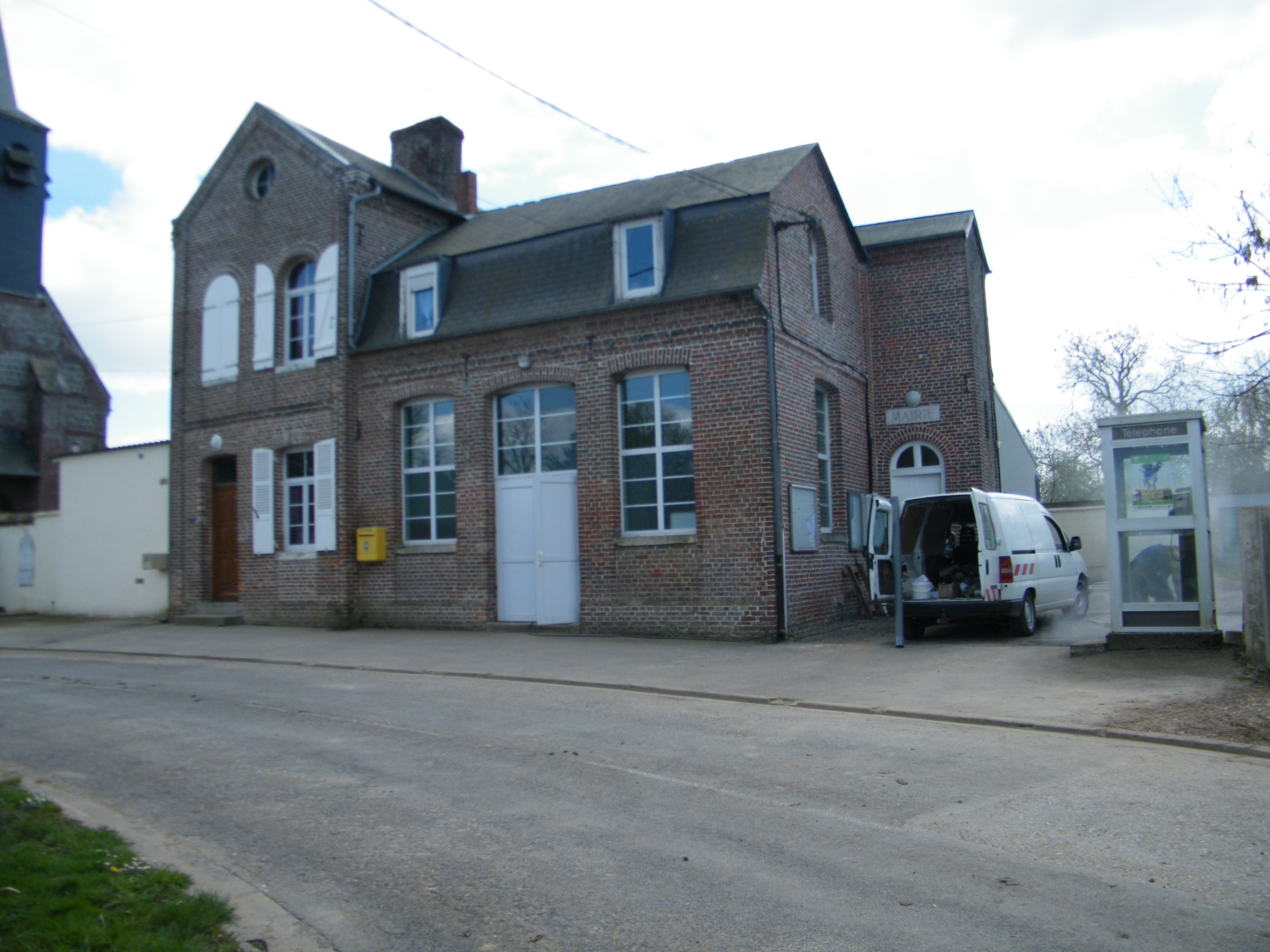 La mairie, l'ancienne école.